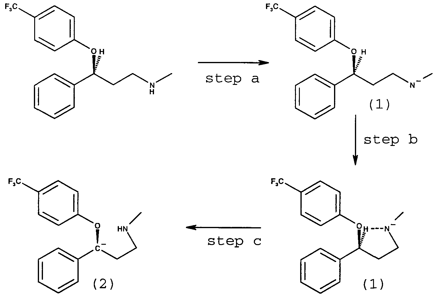 флуоксетин синтез